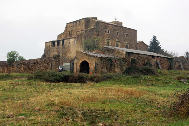 castell de Vilarig_Alt Empordà - Catalunya